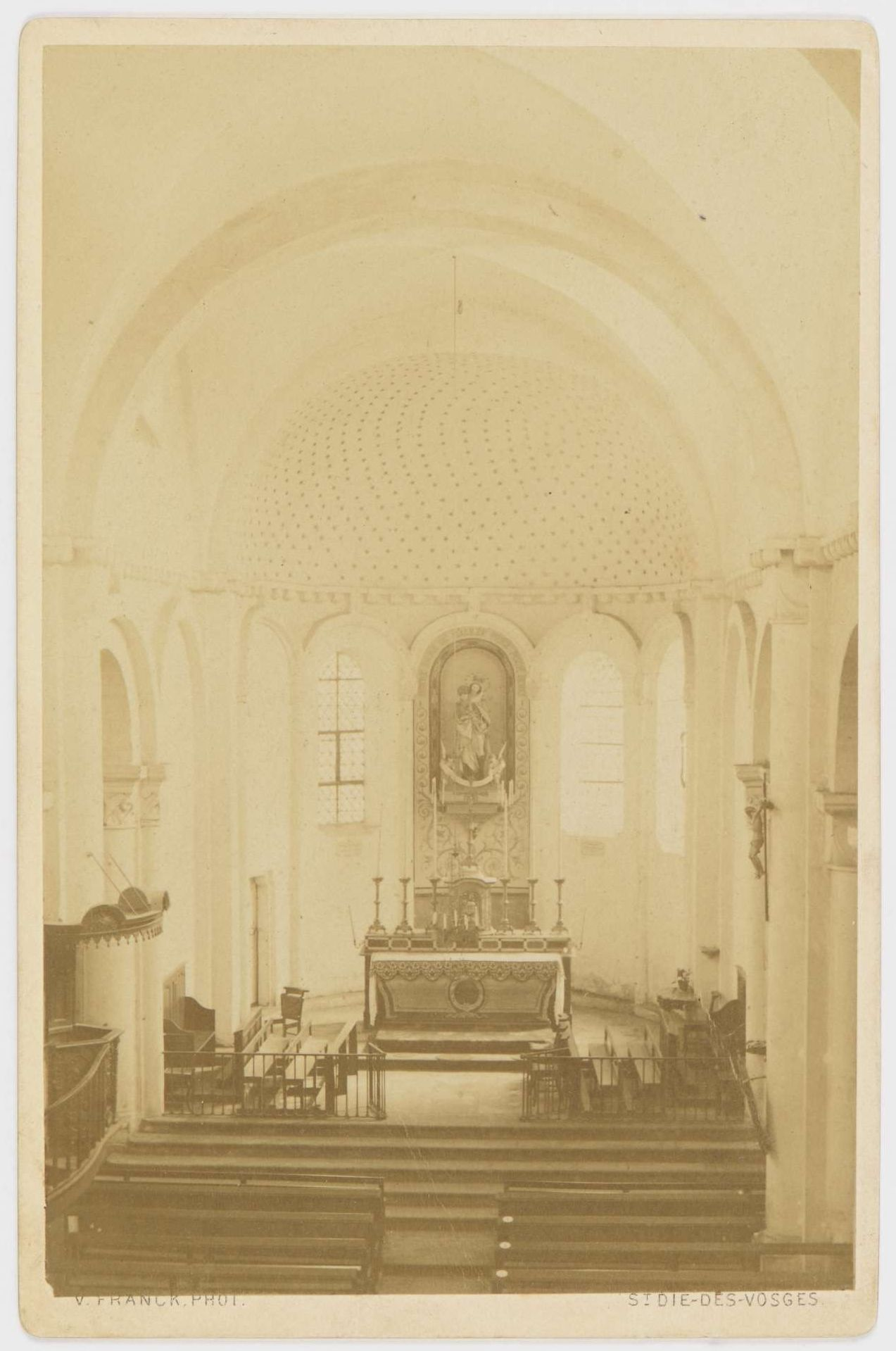 Intérieur du chœur : vue de la tribune vers le chœur. Photographié par Victor Franck, Saint-Dié. Montage du photographe au verso. Échelle : 2 cm / 1 m. Photographie issue des dossiers de travaux de restauration des cathédrales (1802-1912, conservés aux Archives nationales (inventaire et documents numérisés consultables en ligne).